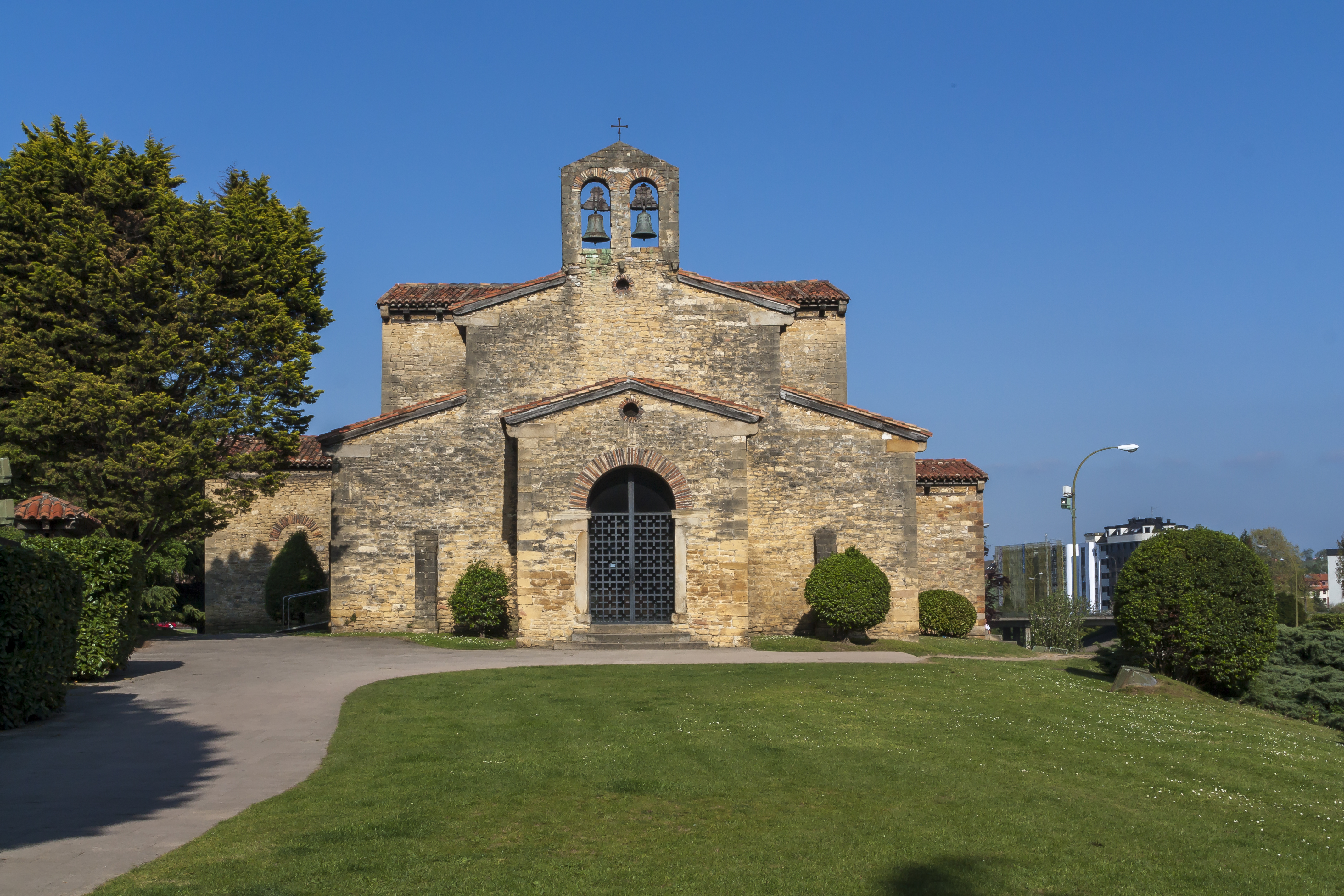 Oviedo, de ayer a hoy.